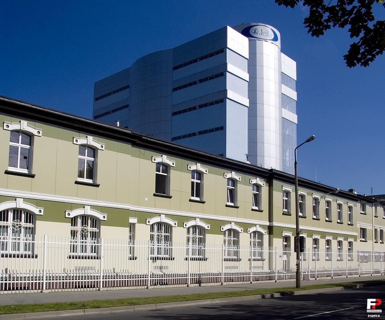 Biurowiec i stołówka Jelfy po liftingu. Nad nimi góruje magazyn wyrobów gotowych.